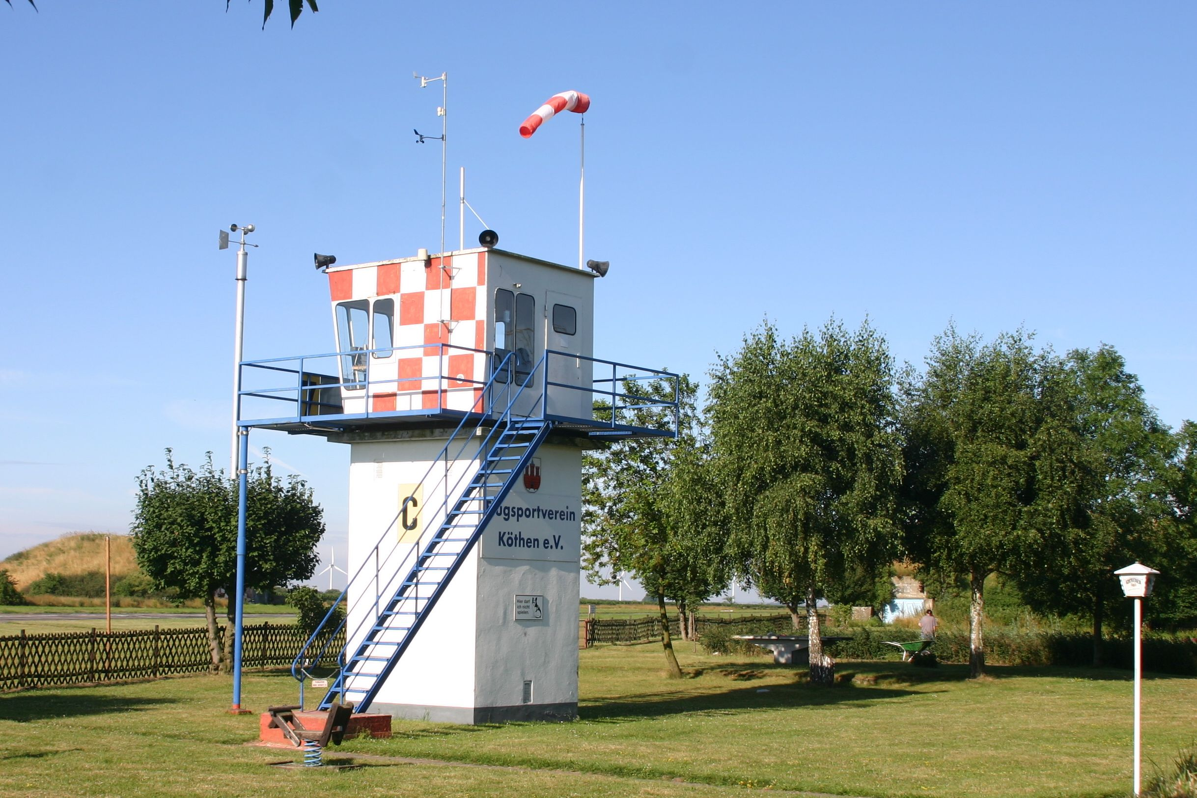 Flugplatz in Köthen (Anhalt).